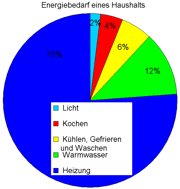 Energiebedarf eines Haushalts